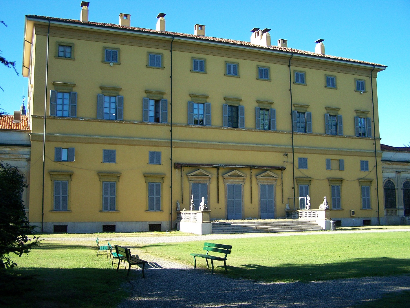 Villa Annoni, il fronte sul giardino. Cuggiono (MI) - Italy